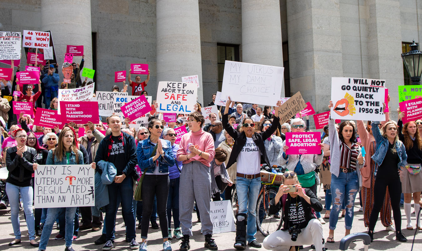 IMG_1000-(214)